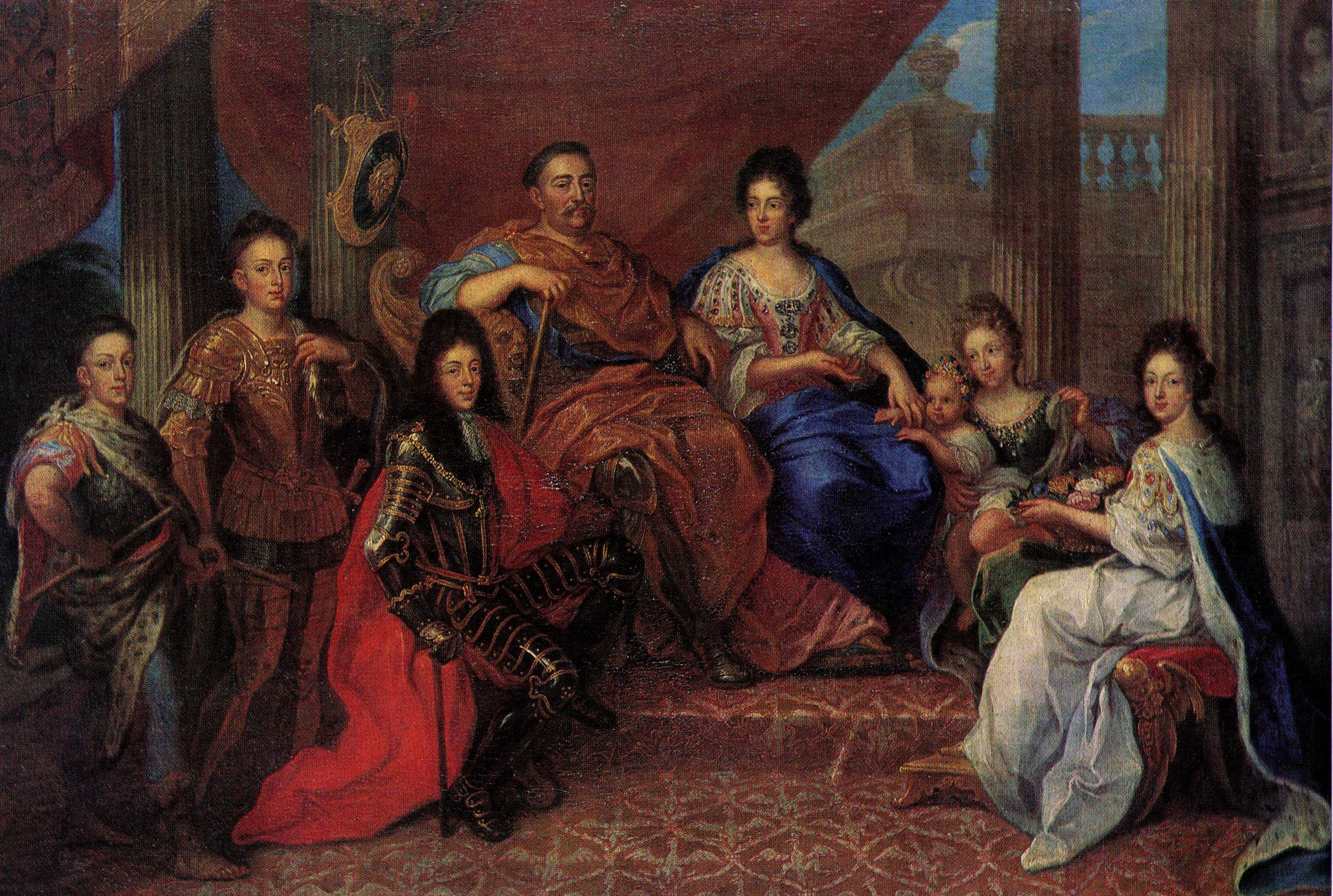 Portret rodziny Sobieskich